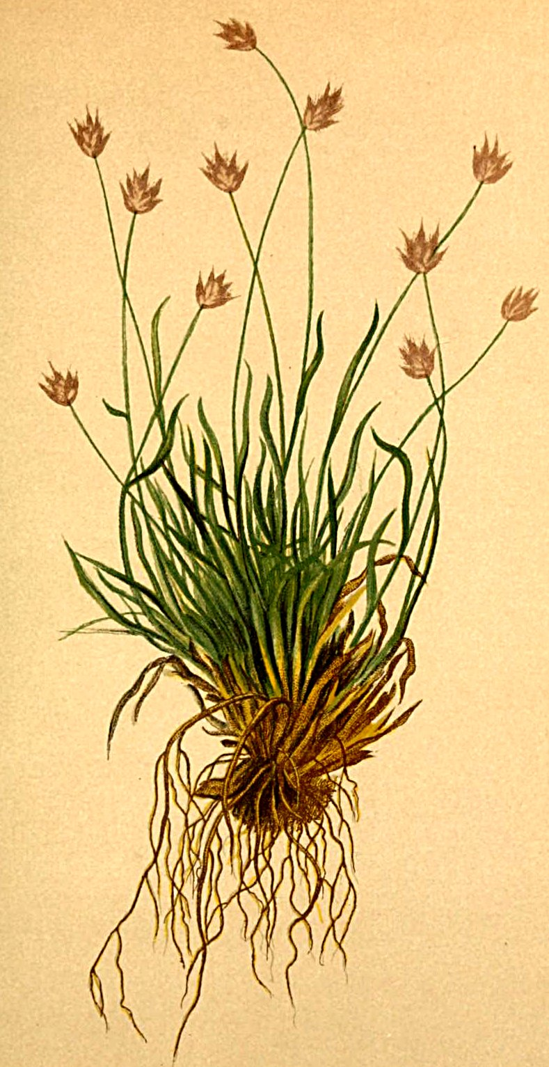 Sesleria ovata